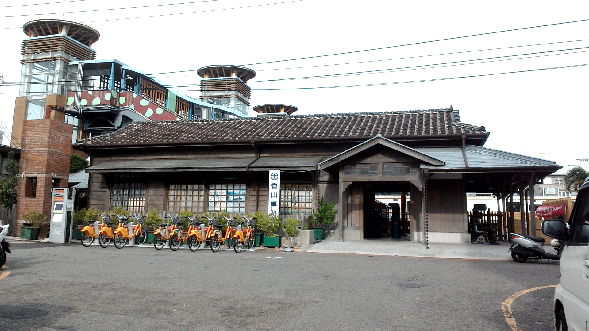 台鐵香山車站全景,台灣省新竹市香山區香山聯里朝山里